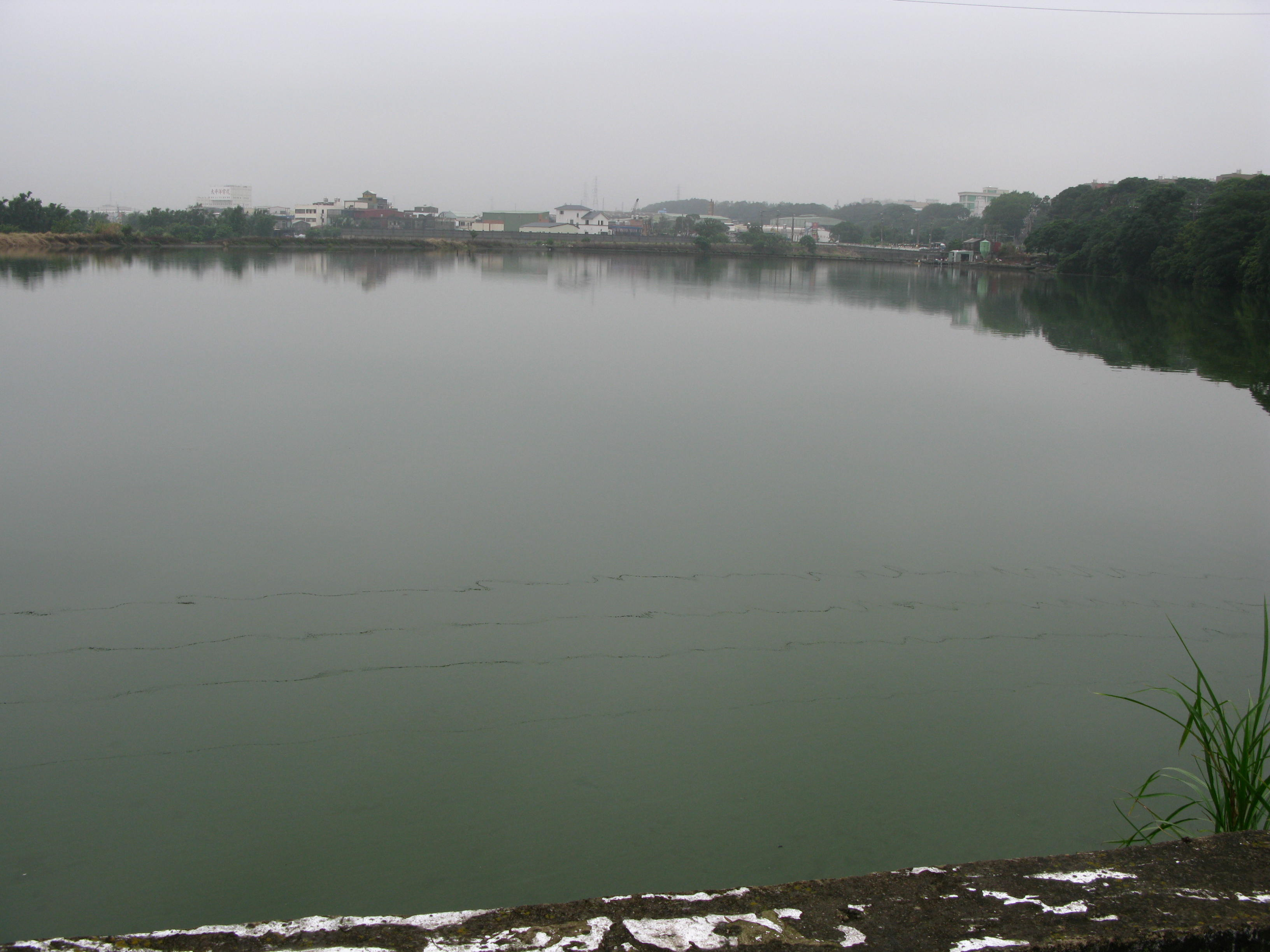 臺灣桃園縣八德市霄裡池。